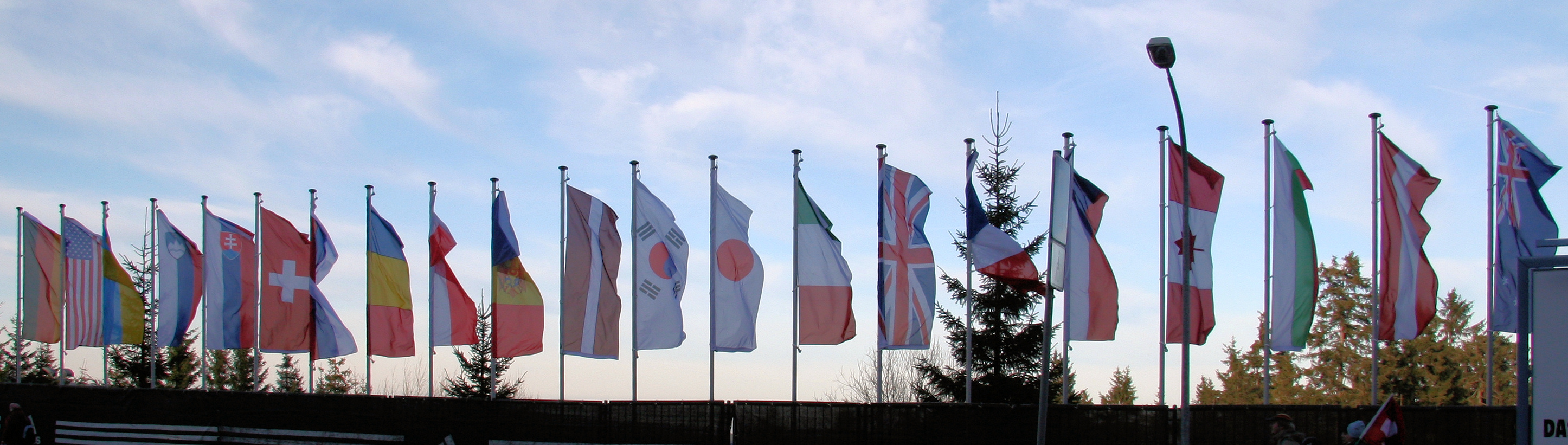 Die Flaggen der 21 teilnehmenden Nationen